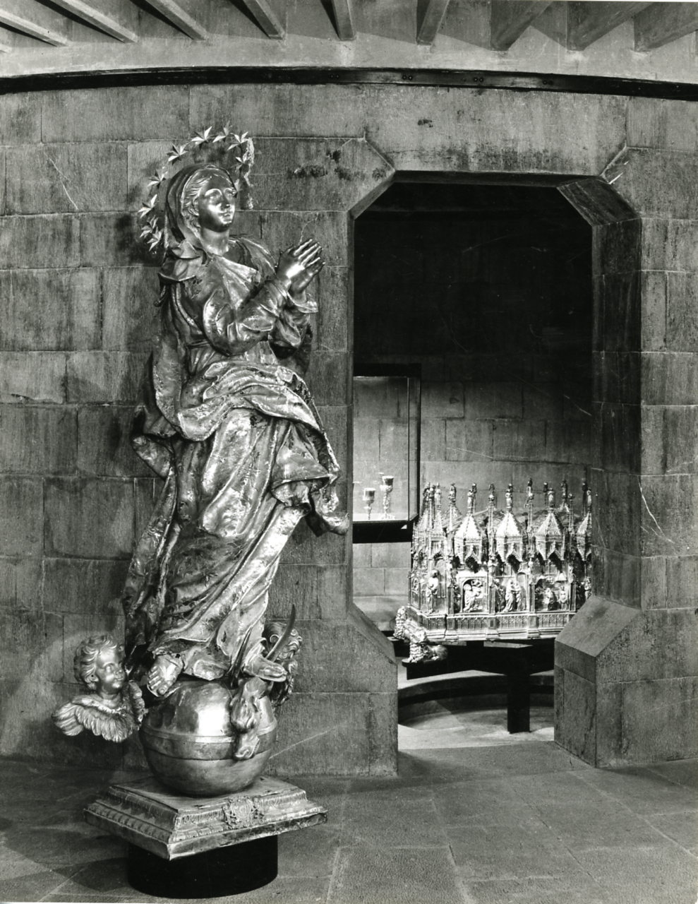 Servizio fotografico : Genova, 1963 / Paolo Monti. - Stampe: 7 : Positivo b/n, gelatina bromuro d'argento/ carta, 24x30. - ((Sul coperchio della scatola, manoscritto a pennarello: "Musei". - Fonte: Agenda di Paolo Monti: Archivio fino 1-4-1961/ 31-3-1963 (1961-1963), presso Archivio Paolo Monti. - Fonte: Agenda di Paolo Monti: R 1 - Monti/ 1 aprile 1963 - 6 giugno 1964/ 6000-8193 (1964-1964), presso Archivio Paolo Monti. - Fonte: Quaderno di Paolo Monti: s.t. [Soggetti e committenti] (1956-1961), presso Archivio Paolo Monti